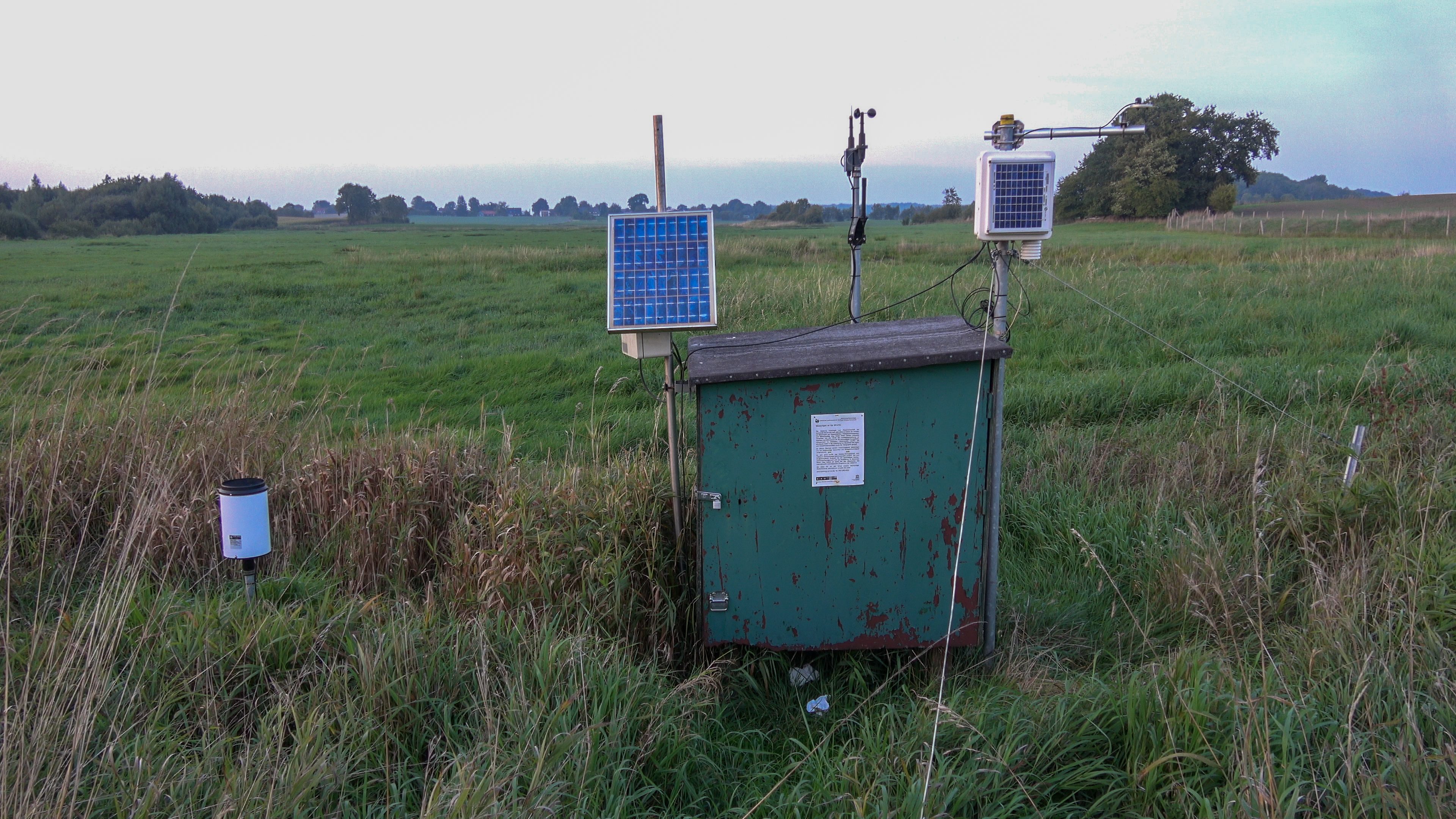 Messstation an der Kilestau in Ausacker